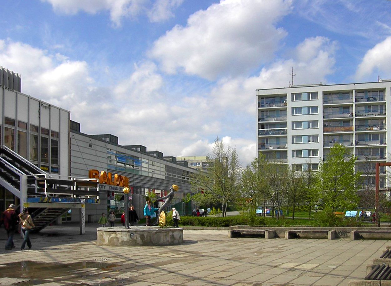 Multikino Galaxie,Praha Háje